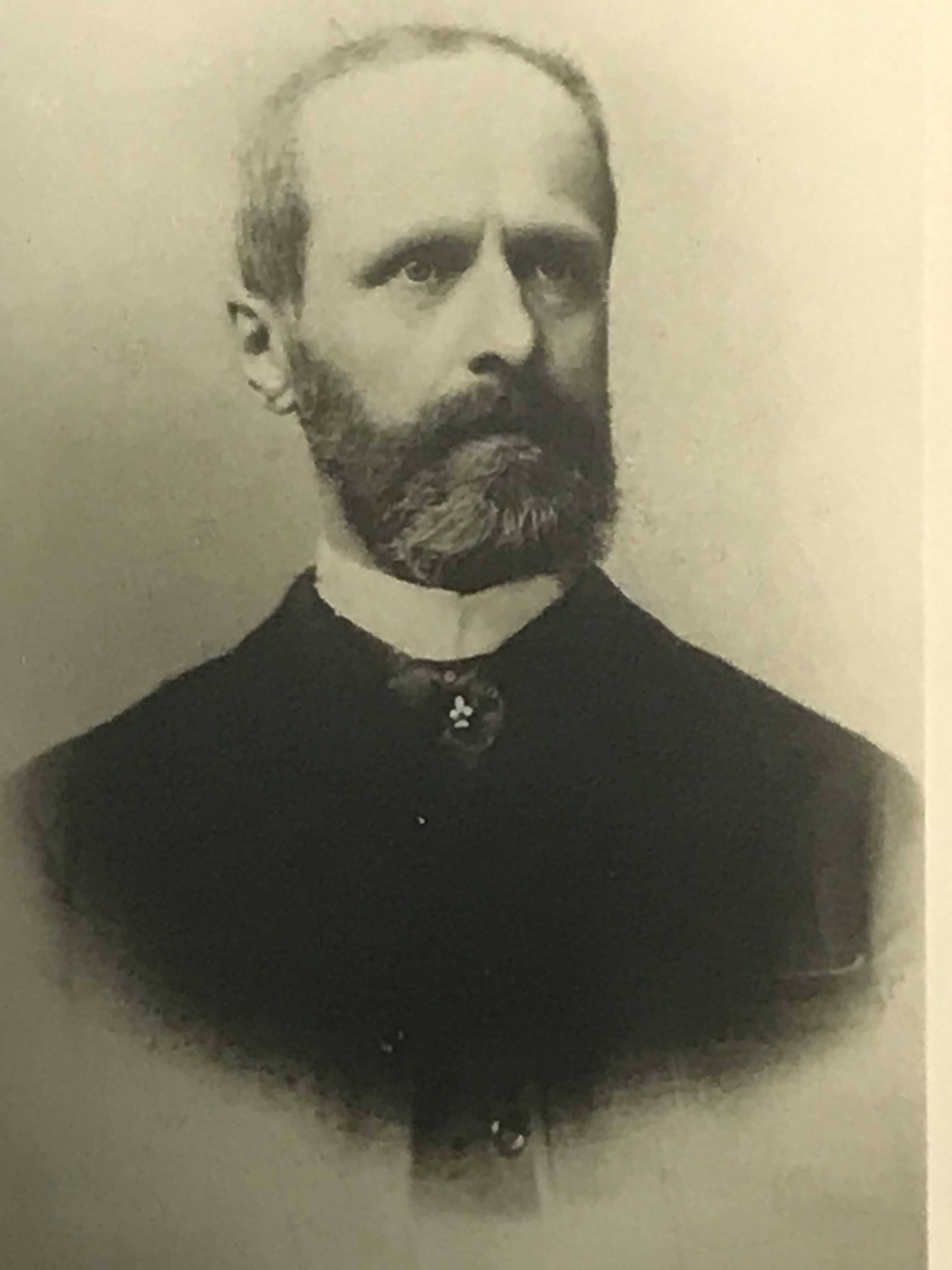 Otto von Batocki, Mitglied des Reichstags (Foto um 1880)